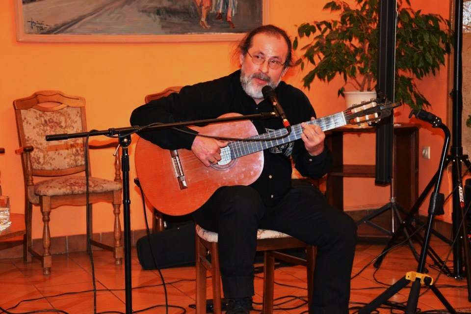 Antoni Muracki